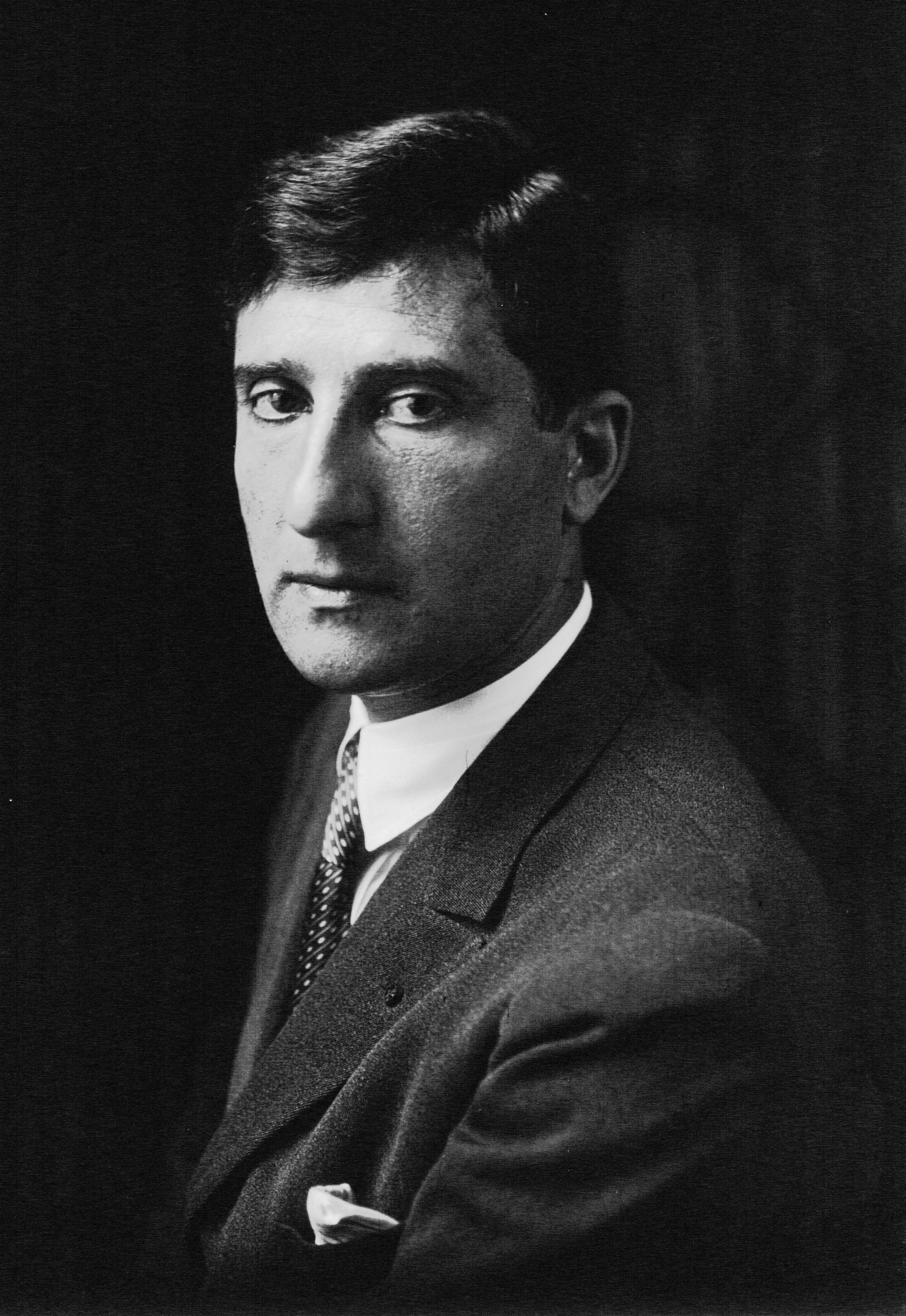 M. Weiller, administrateur de la Société Gnome et Rhône : [photographie de presse] / Agence Meurisse.